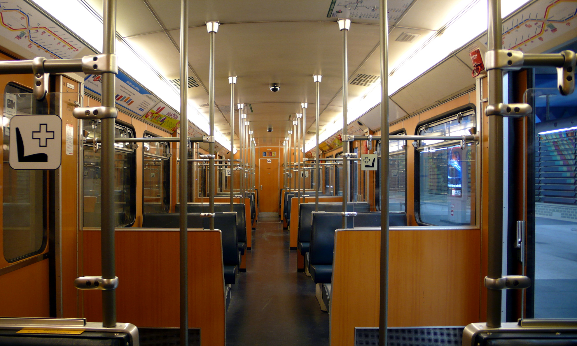 Doppeltriebwagen 453/454 der U-Bahn Nürnberg im Bahnhof Fürth-Hardhöhe, Innenraumaufnahme